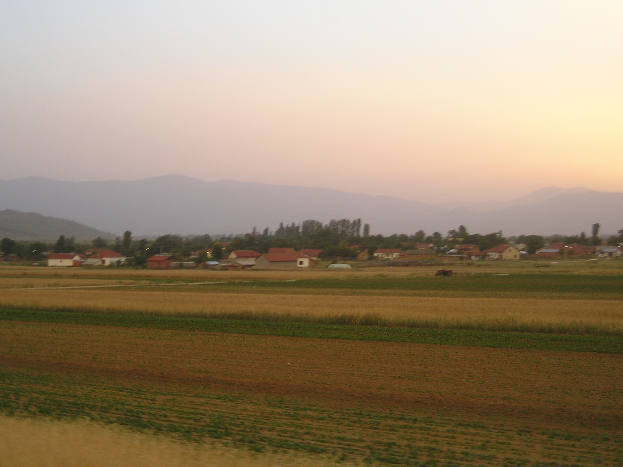 Senokos, Prilep, Macedonia